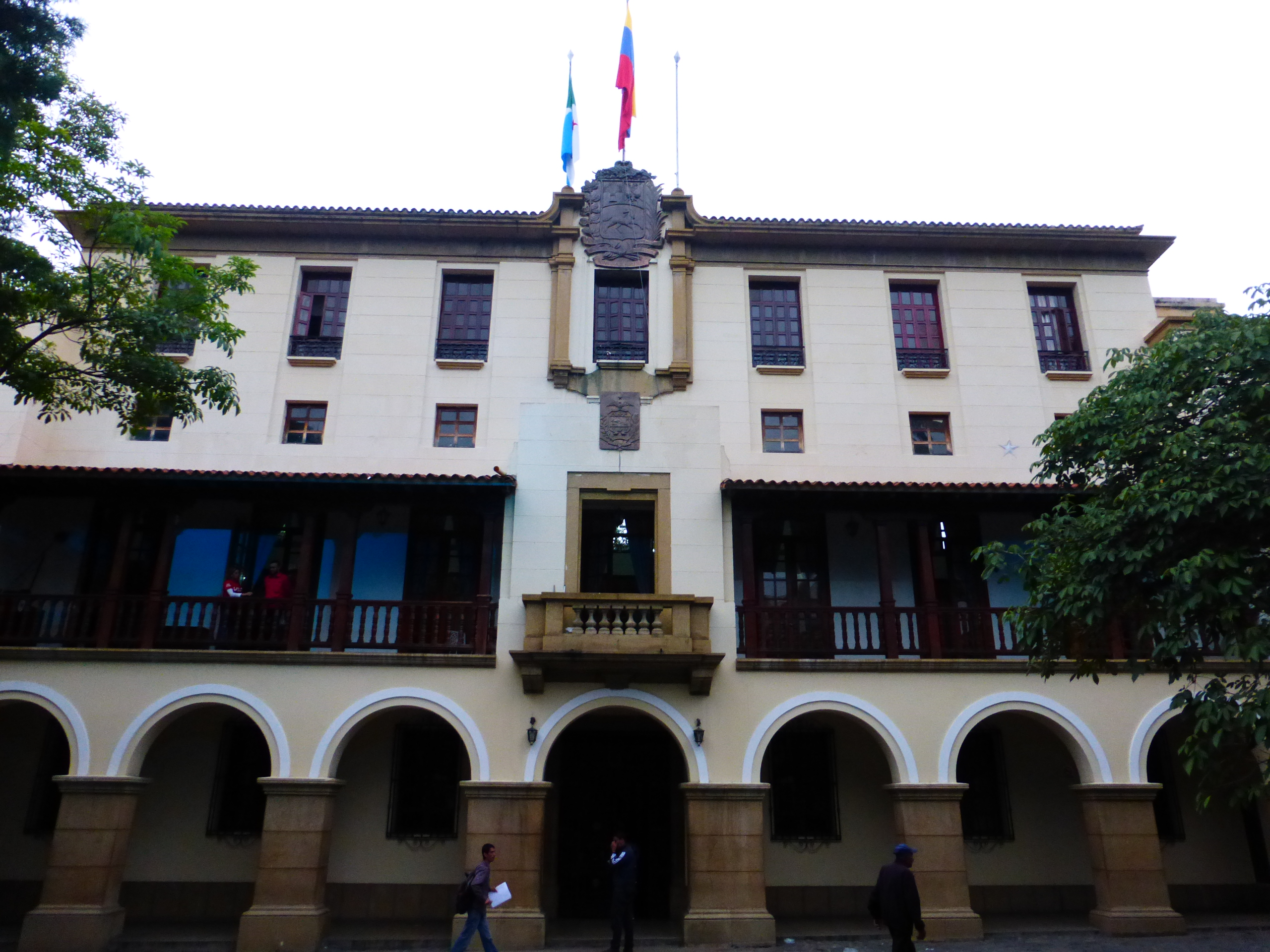 Gobernación del Estado Mérida